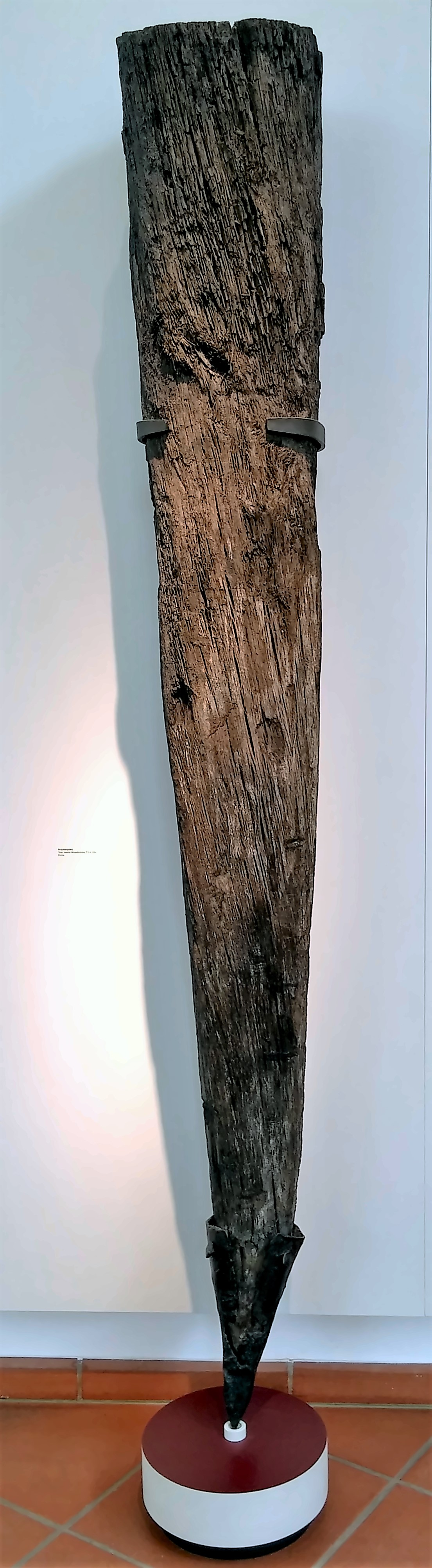 Strompfeiler aus Eiche mit eisernem Metallschuh(spitze). Der erhaltene Brückenpfahl stammt von der zweiten Moselbrücke (Trier) 71 n. Chr.